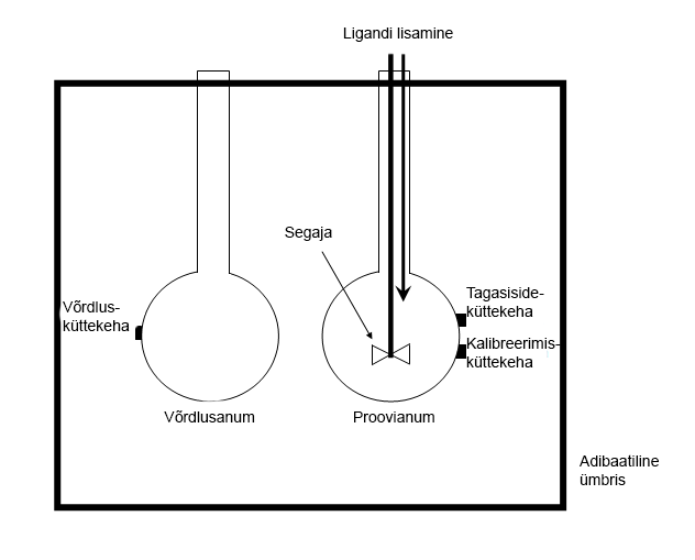 Isotermilise tiitrimis-kalorimeetria seade